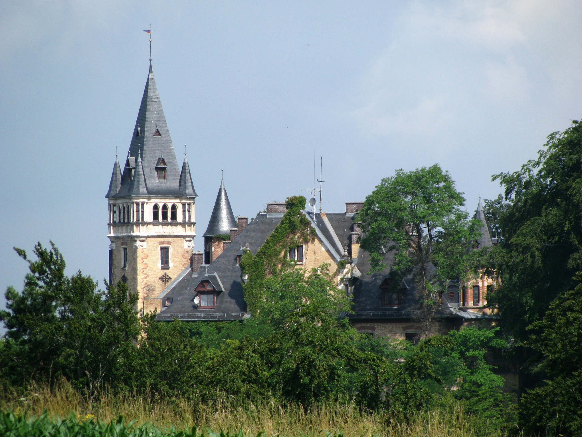 Hochschloss Pähl; Ansicht von Südosten (Hirschberg); die Pähler Schlucht zwischen Kamerastandort und Schloss ist nur zu erahnen